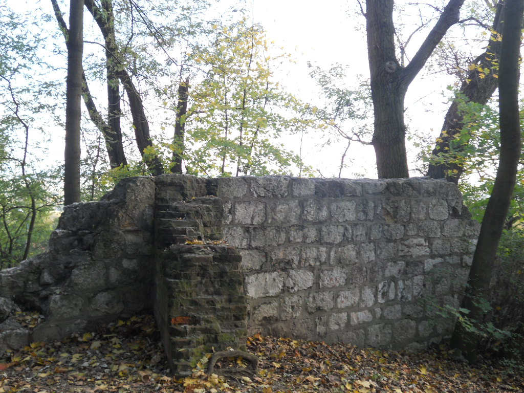 Resztki bramy "Kościuszko", Fort 2 - Kościuszko w Krakowie.